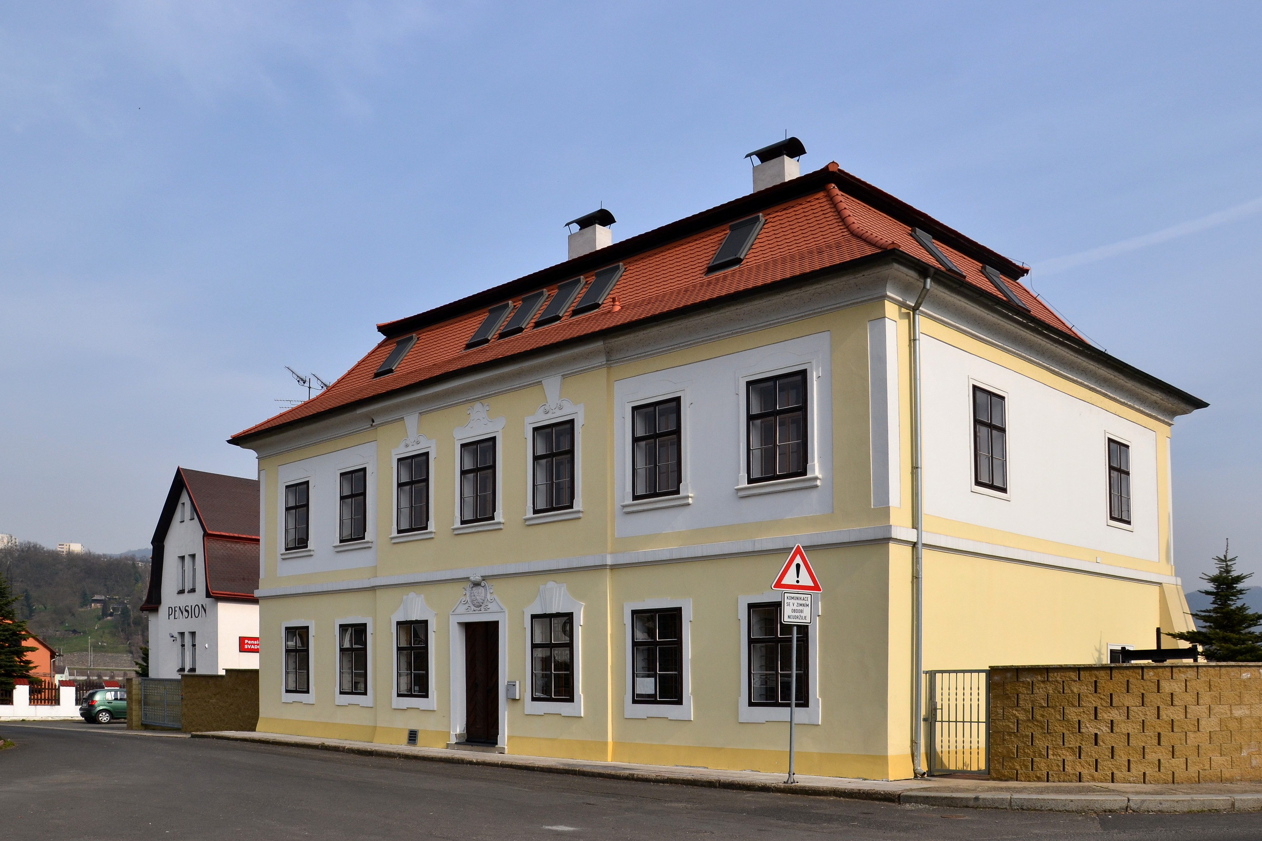 Fara, Labská 1, Vítězná, Svádov.